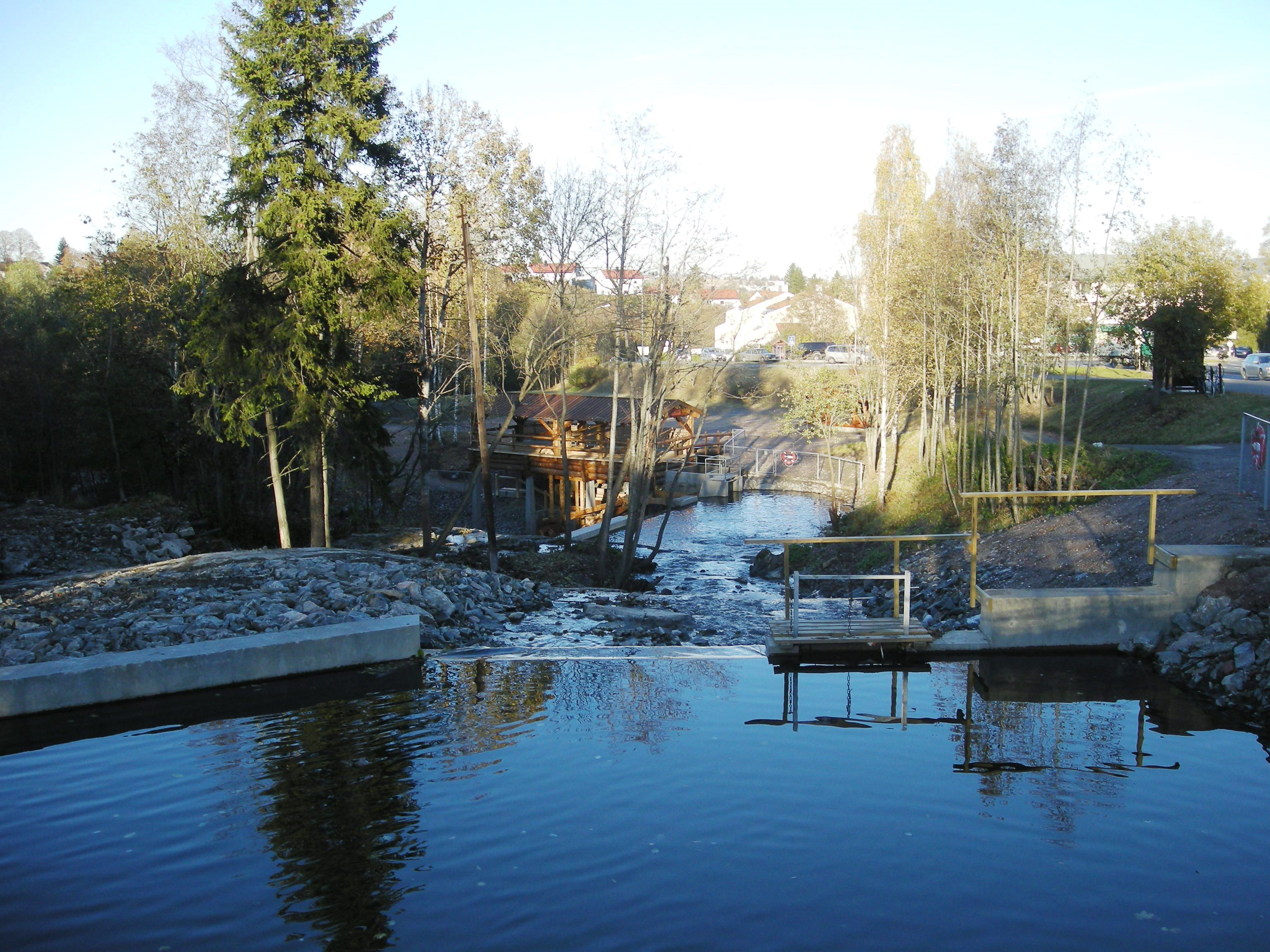 Sagelva nedenfor Strømmen